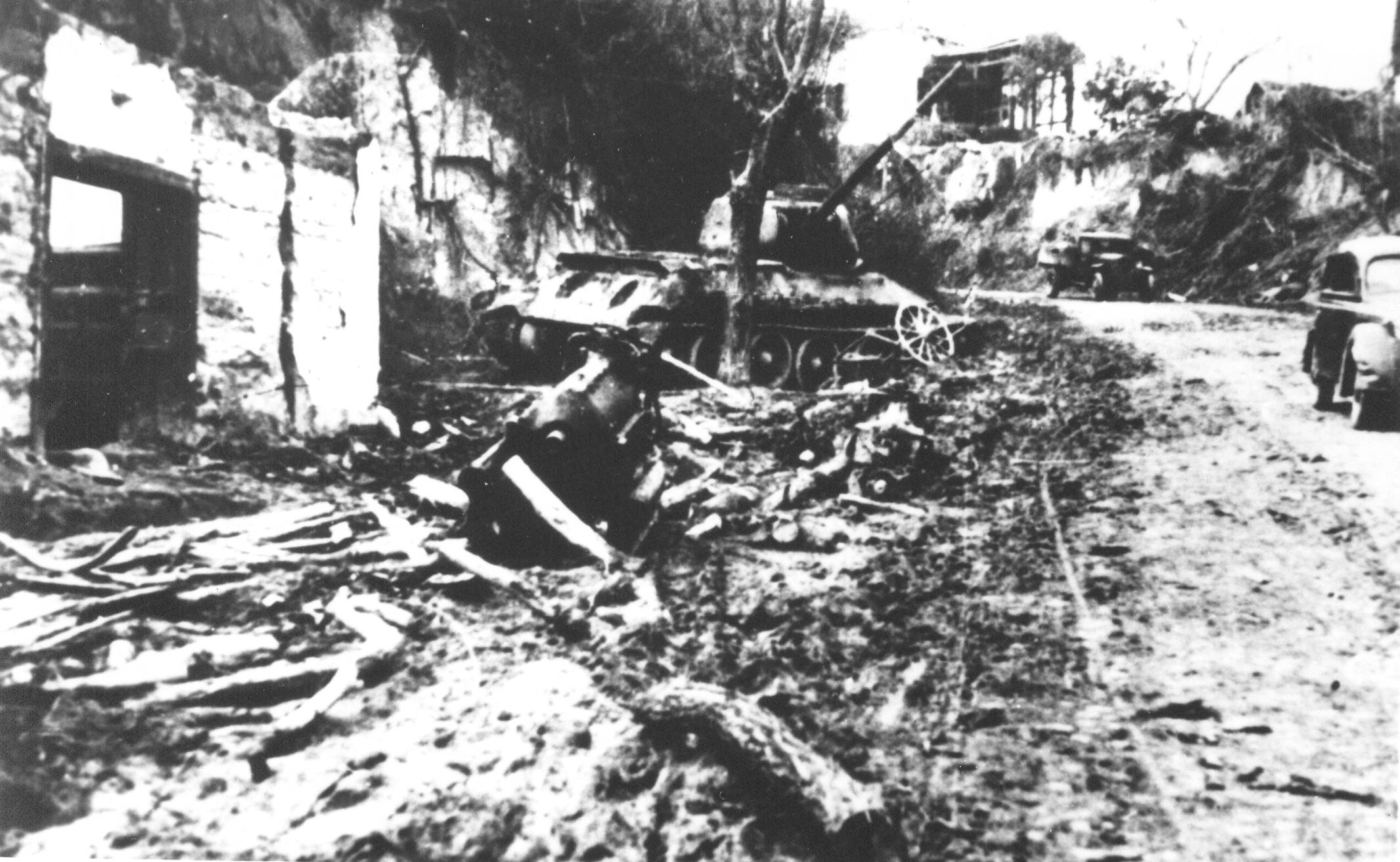 Srpskohrvatski / српскохрватски: Porušene zgrade u Batini nakon bitke. Snimak načinjen prilikom prelaska l. vojvođanske brigade 30.XI.1944.